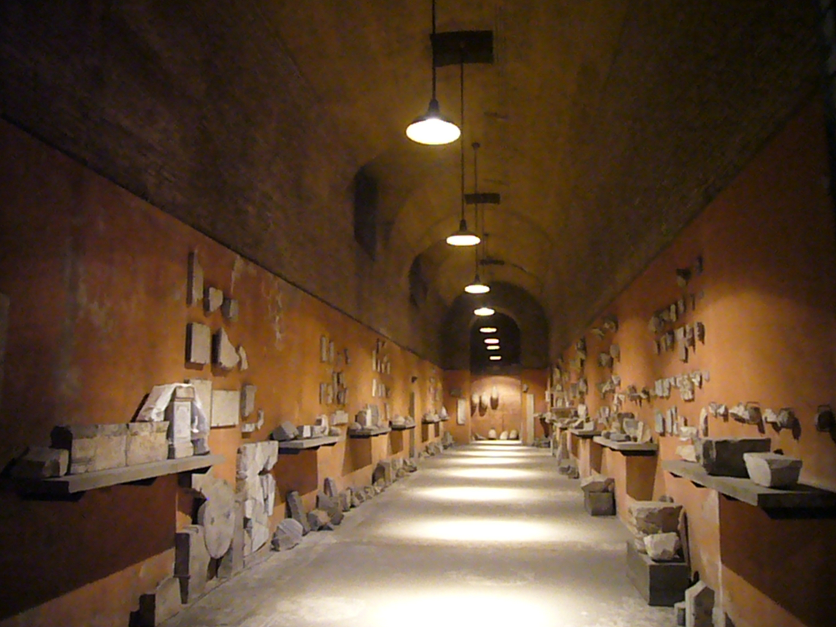 Roma, Laterano, scavi della Caserma degli Equites singulares sotto la basilica di San Giovanni - accesso agli scavi